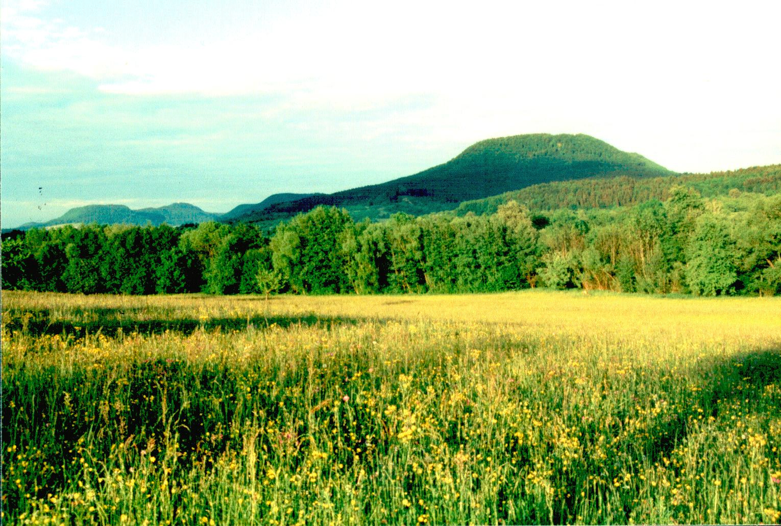 Der Farrenberg, Mössingens Hausberg, von Belsen aus gesehen. Im Vordergrund blühende Wiesen, gelb von Scharfem Hahnenfuß.